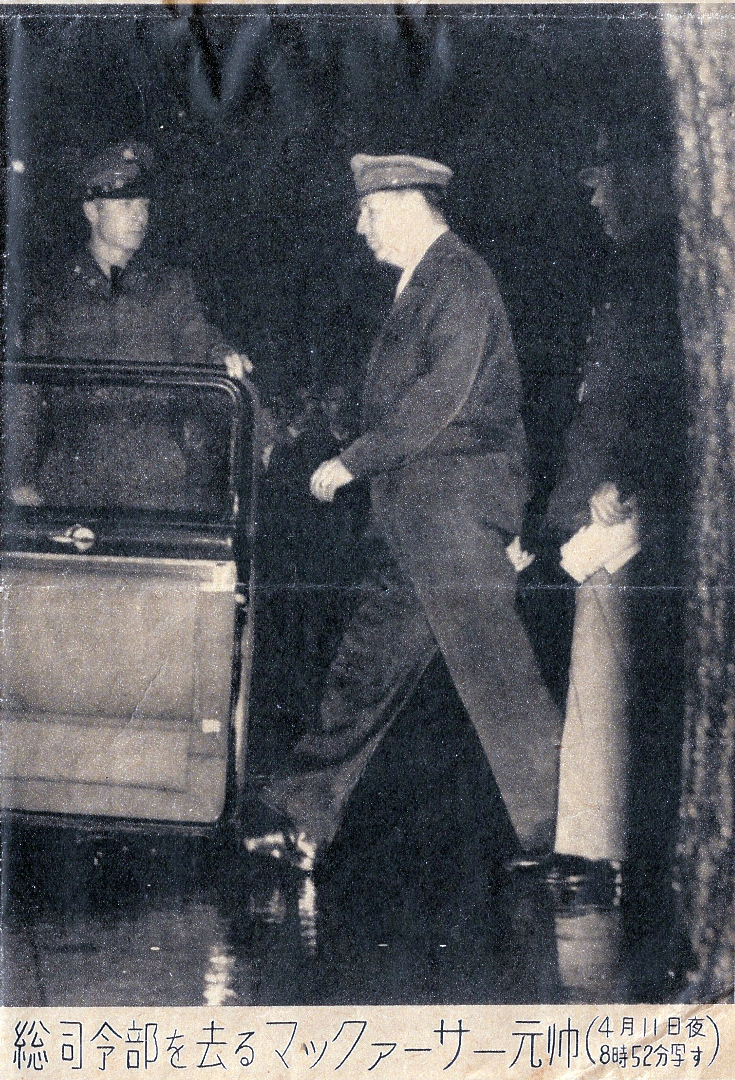 GHQを去るマッカーサー